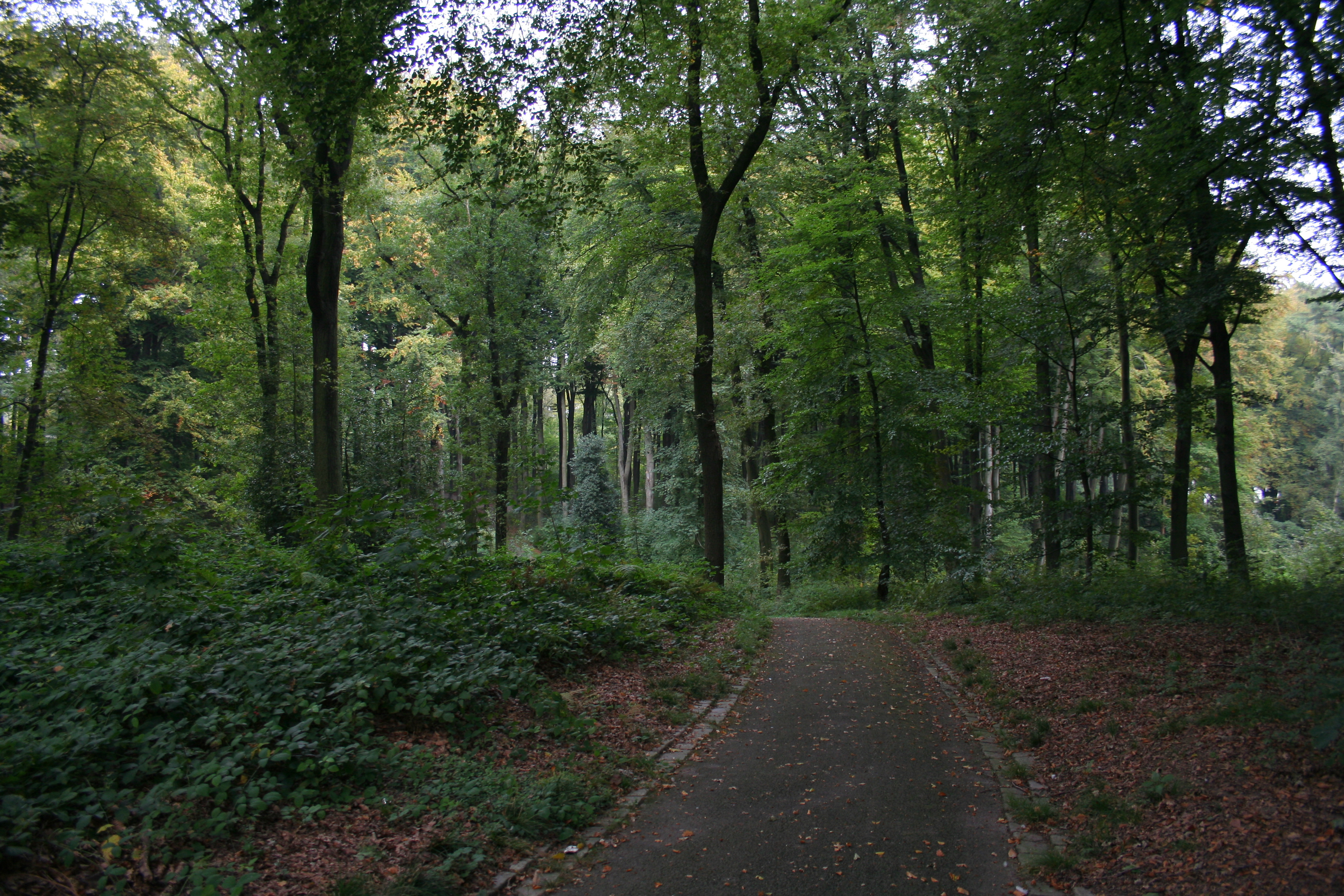 Volksgarten Lütgendortmund in Dortmund. Eine Allee.